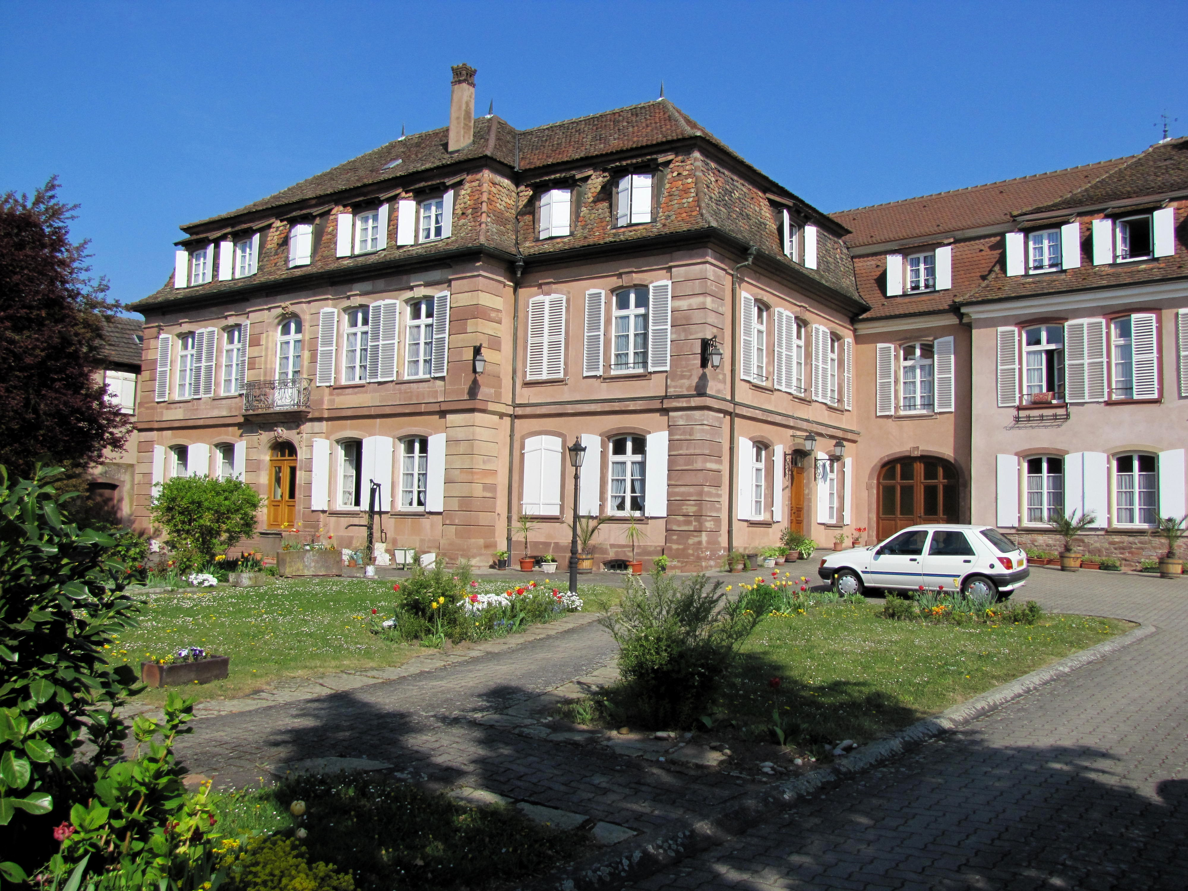 Alsace, Bas-Rhin, Marlenheim, Château Petite-Sorbonne (XVIIIe), aujourd'hui maison de retraite (IA67006686).